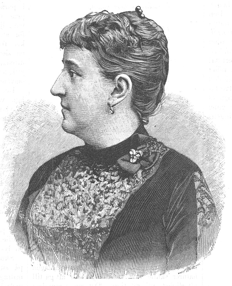 Helena Munktell (1852-1919)